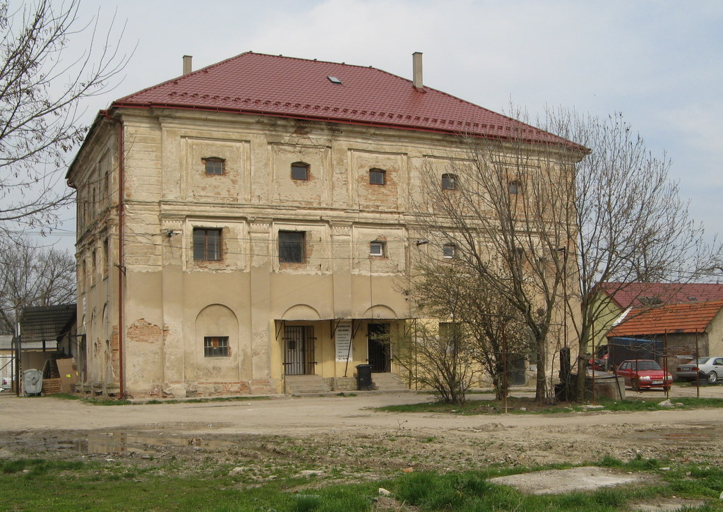 Južné priečelie kaštieľa z Lieskovskej cesty